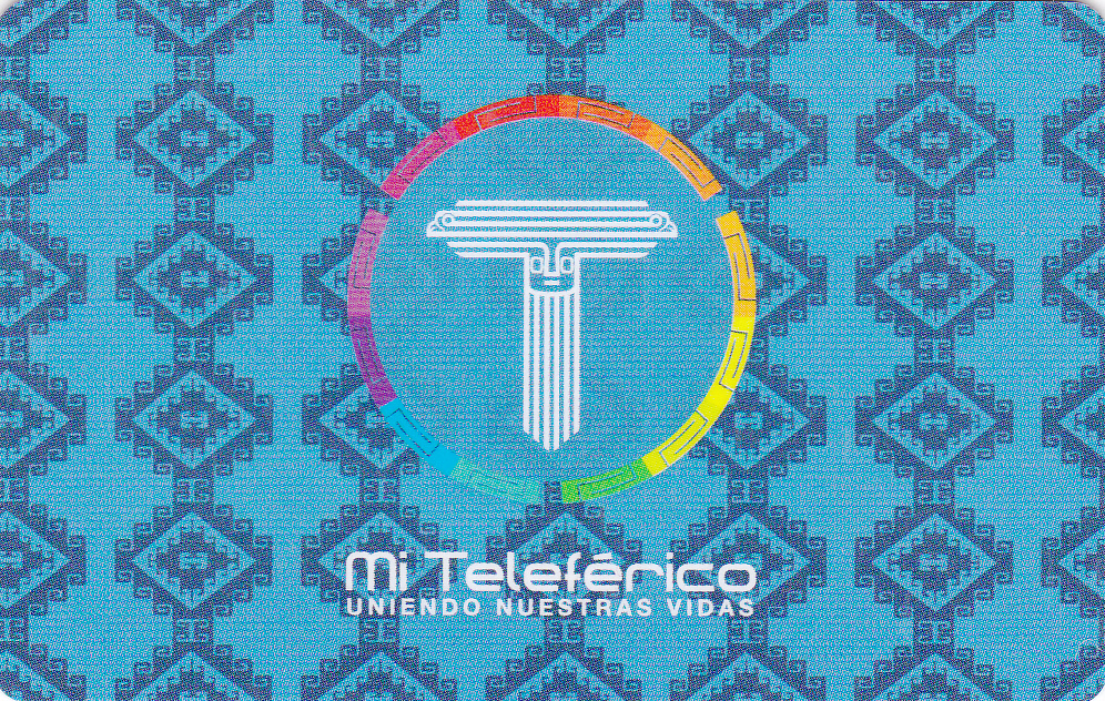 Escaneado de targeta mi teleferico